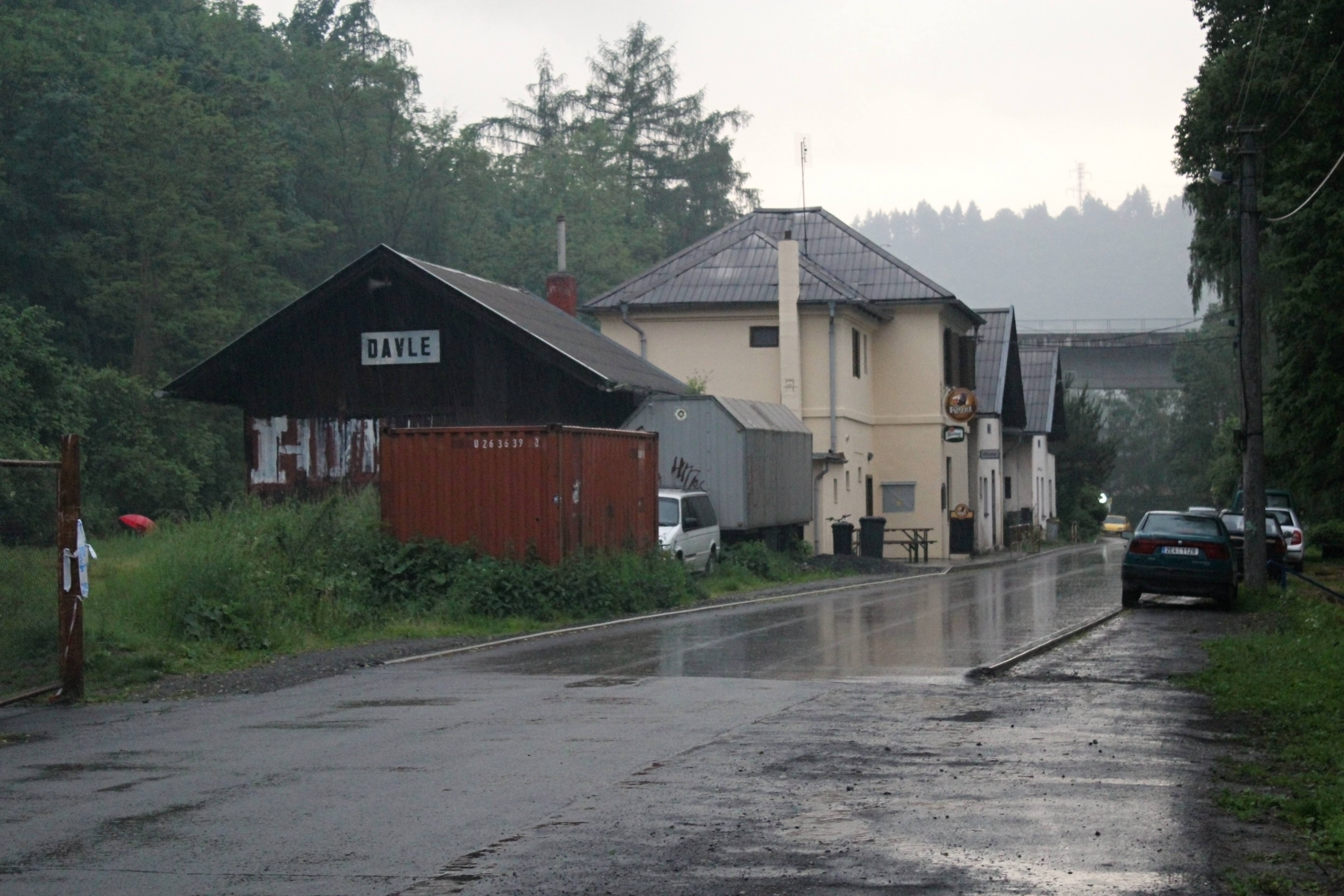 Davle nádraží pohled z dálky ze severu z pravého okraje silnice na sklad restauraci a nádraží 23. 5. 2014